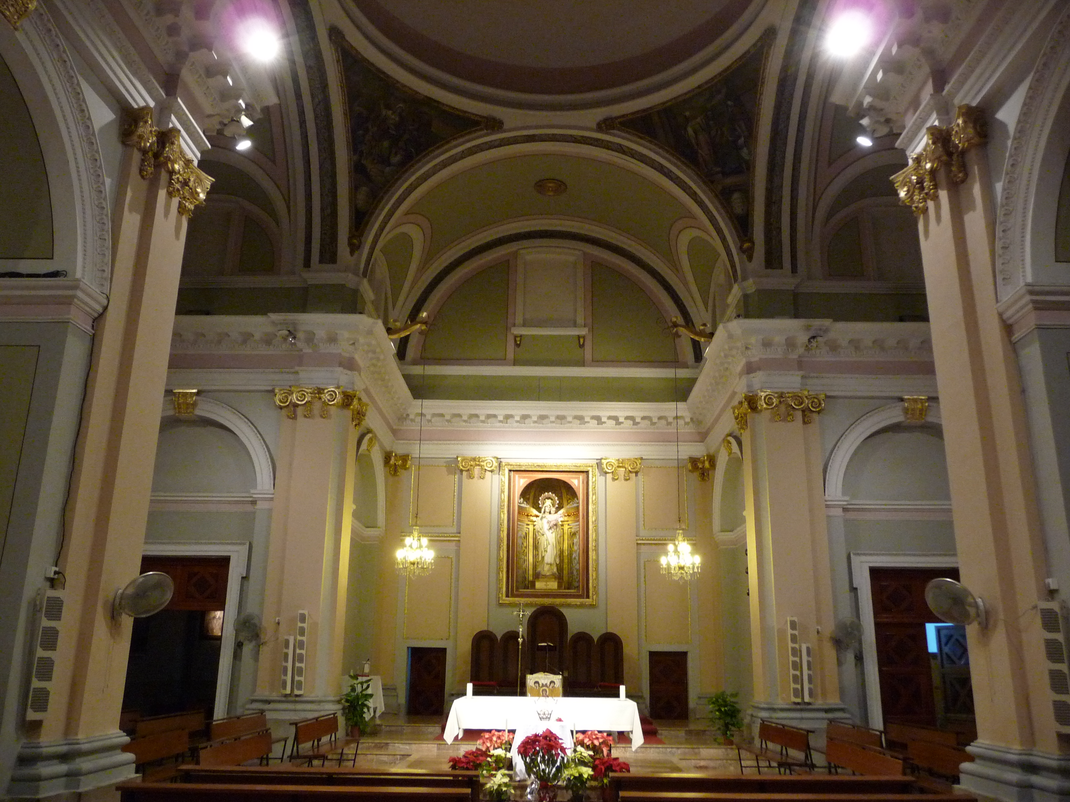 Església de la Mercé, a Borriana (província de Castelló, Espanya)